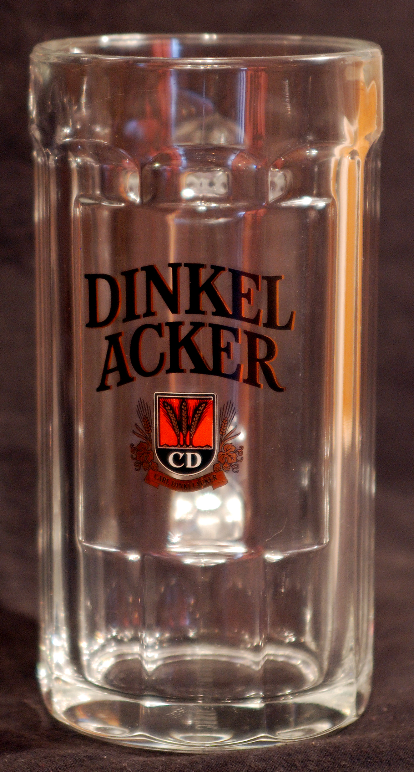 Dinkel Acker beer glass